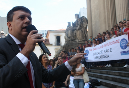 Robson Leite em ato em frente à ALERJ, durante a CPI das Universidades Privadas